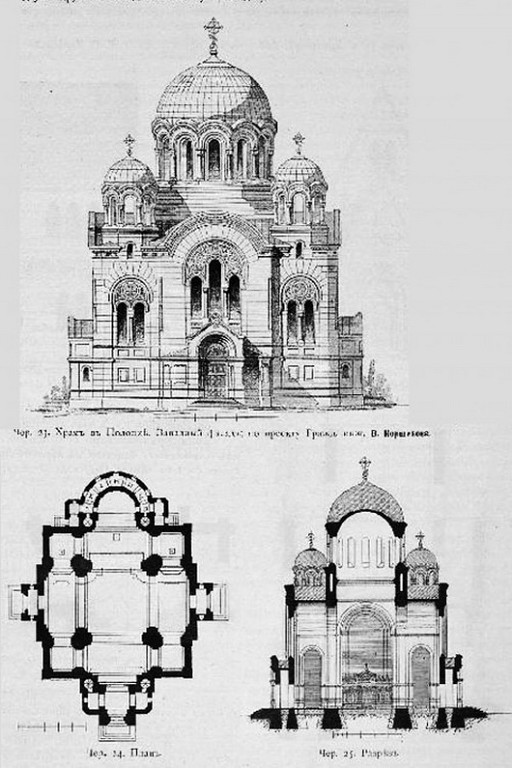 Праект царквы Уздзвіжання Святога Крыжа. Спаса-Ефрасіннеўскі манастыр, Полацк Беларуская (тарашкевіца): Полацак (Połacak), Спас (Spas). Манастыр Спаса-Эўфрасіньнеўскі, праект царквы Ўзьвіжаньня Сьвятога Крыжа